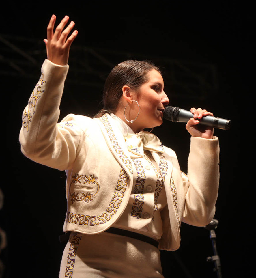 Cierre de campaña en Rancagua